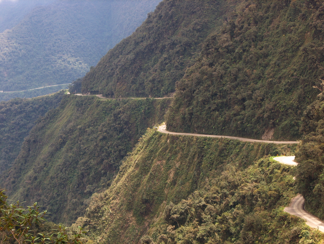 דרך (המוות) היונגאס בבוליביה